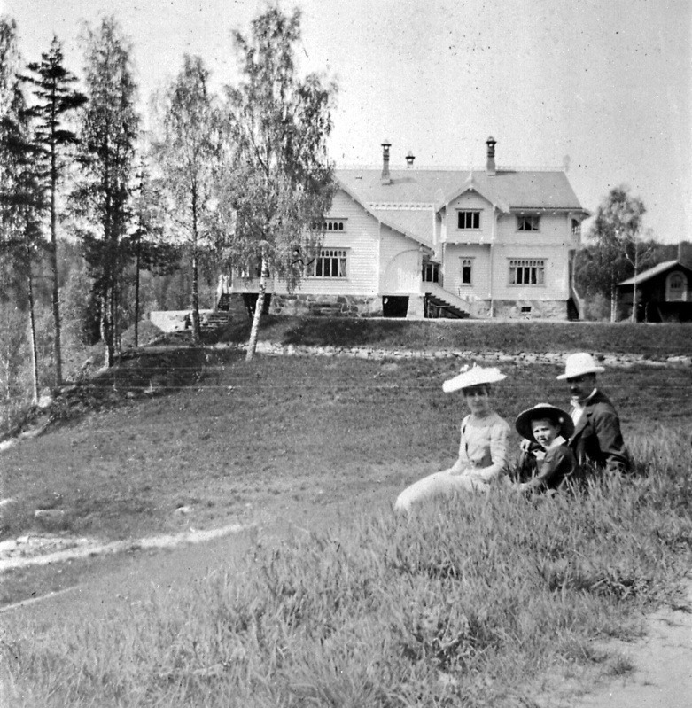 Det nye hovedhuset på Sarabråten, 1903